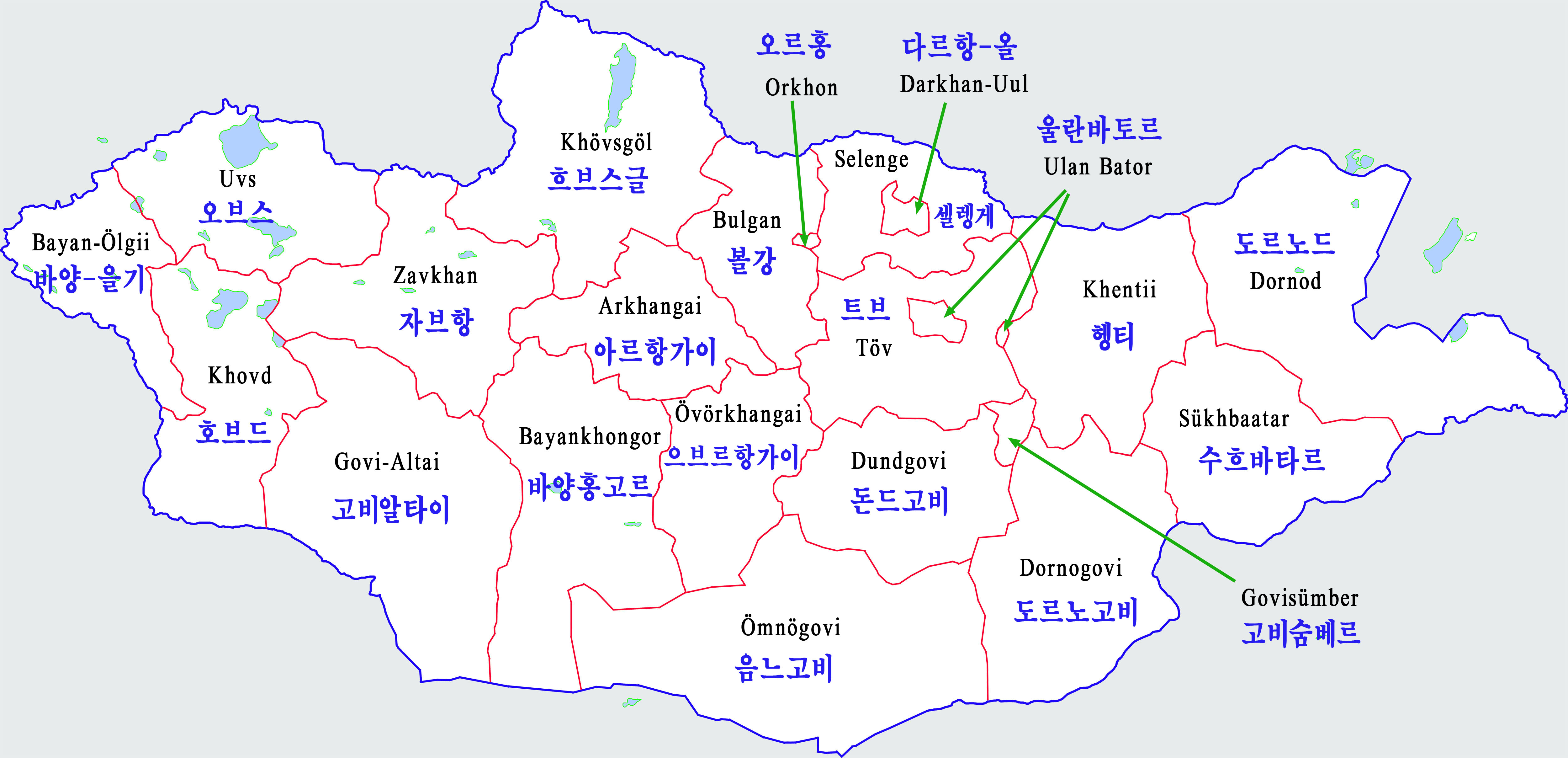 몽고의 행정구역